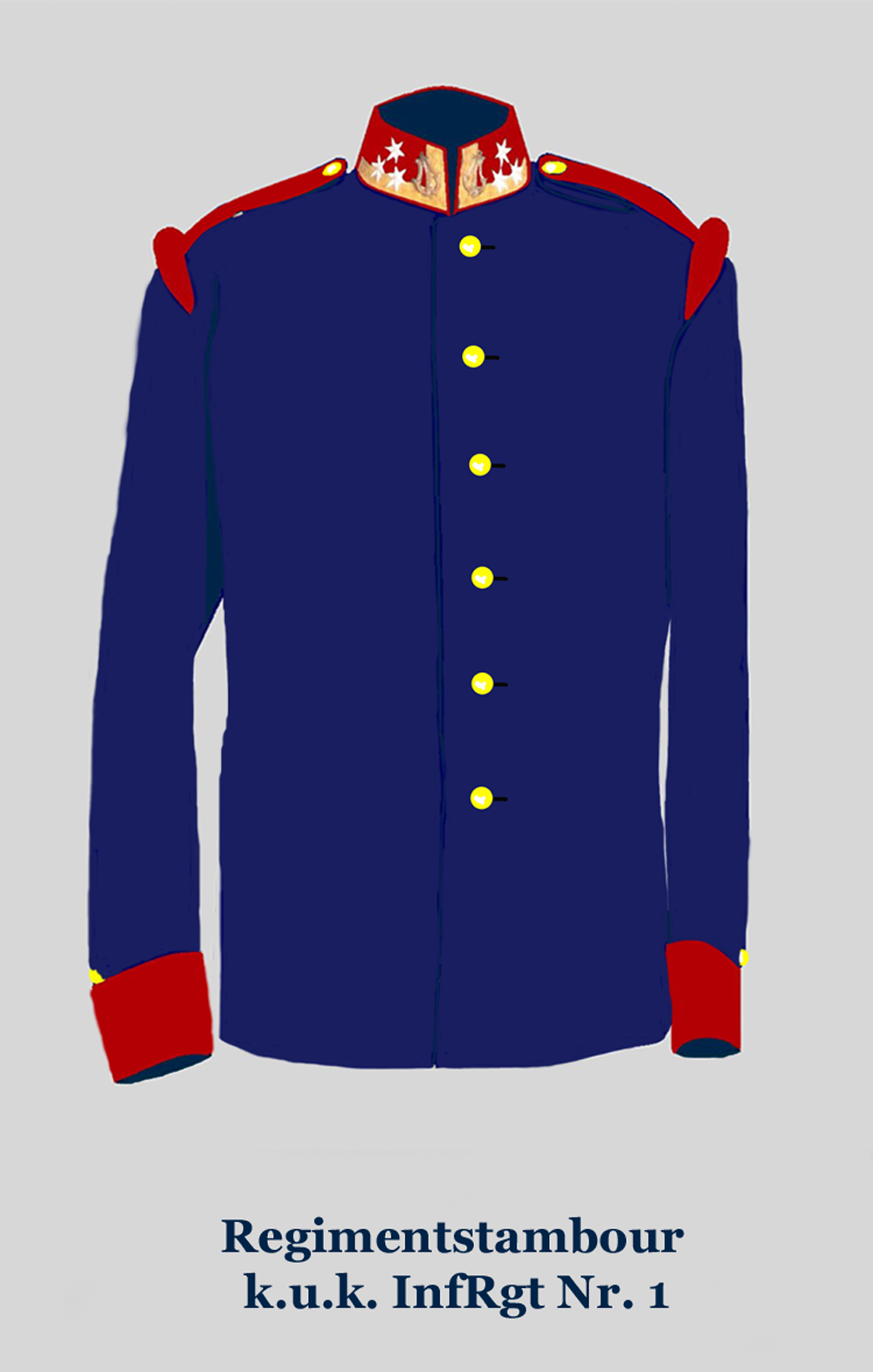 k.u.k. Regimentstambour/Hornist in deutscher Uniform mit dunkelroter Egalisierung und gelben Knöpfen